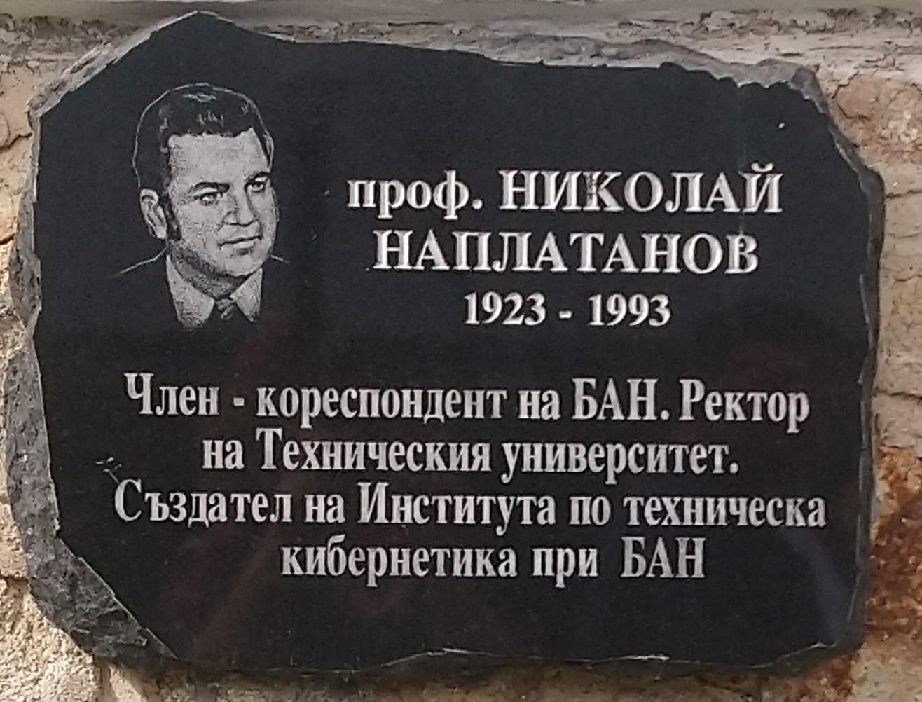 проф. Николай Наплатанов (1923 - 1993) - плоча в Исторически музей Панагюрище - Надпис: Член-кореспондент на БАН. Ректор на Техническия университет. Създател на Института по техническа кибернетика при БАН.